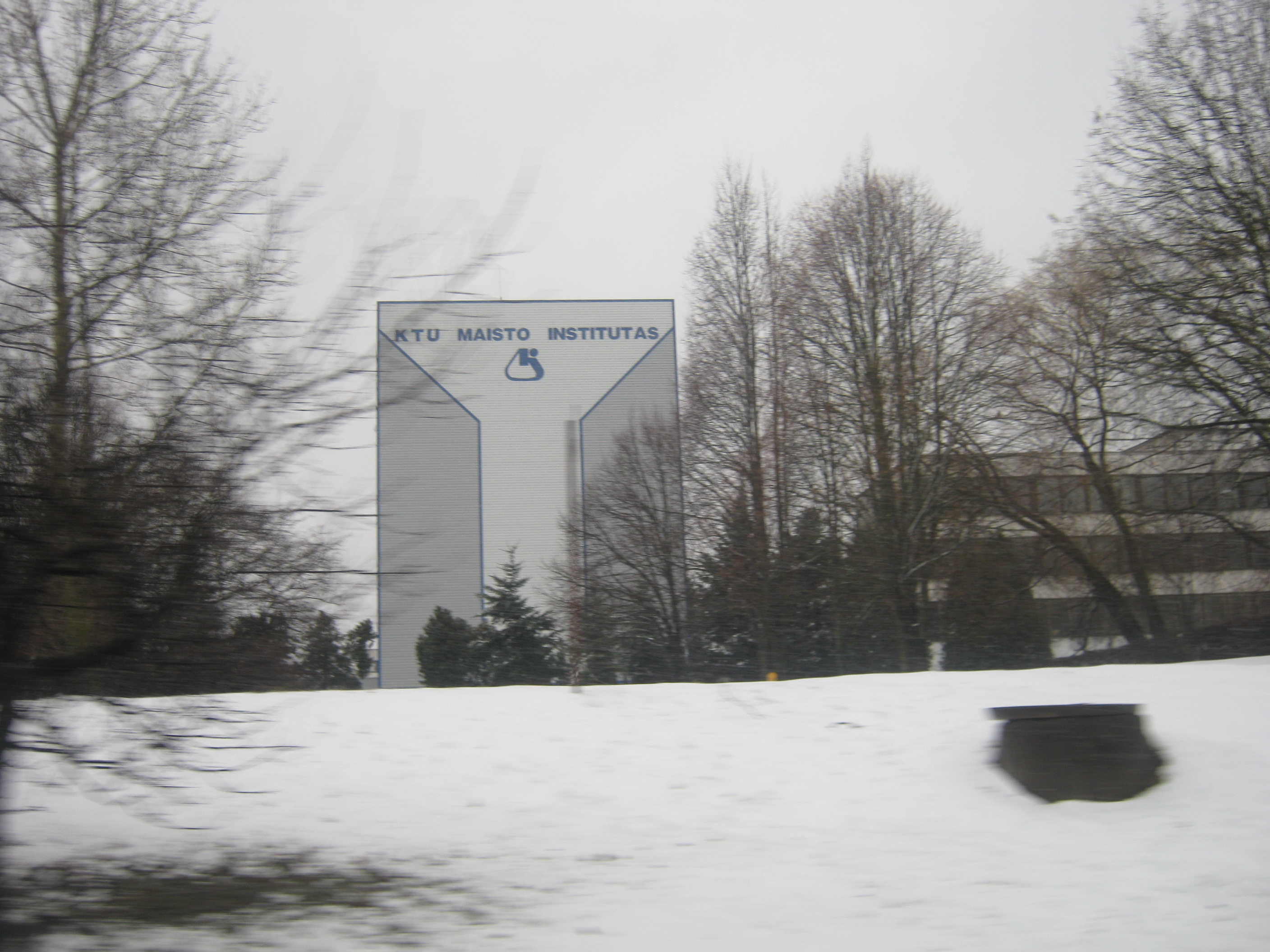 KTU maisto institutas